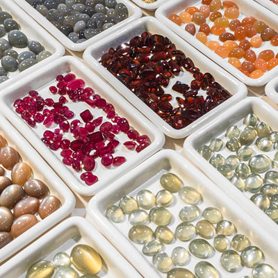 Zone Gem